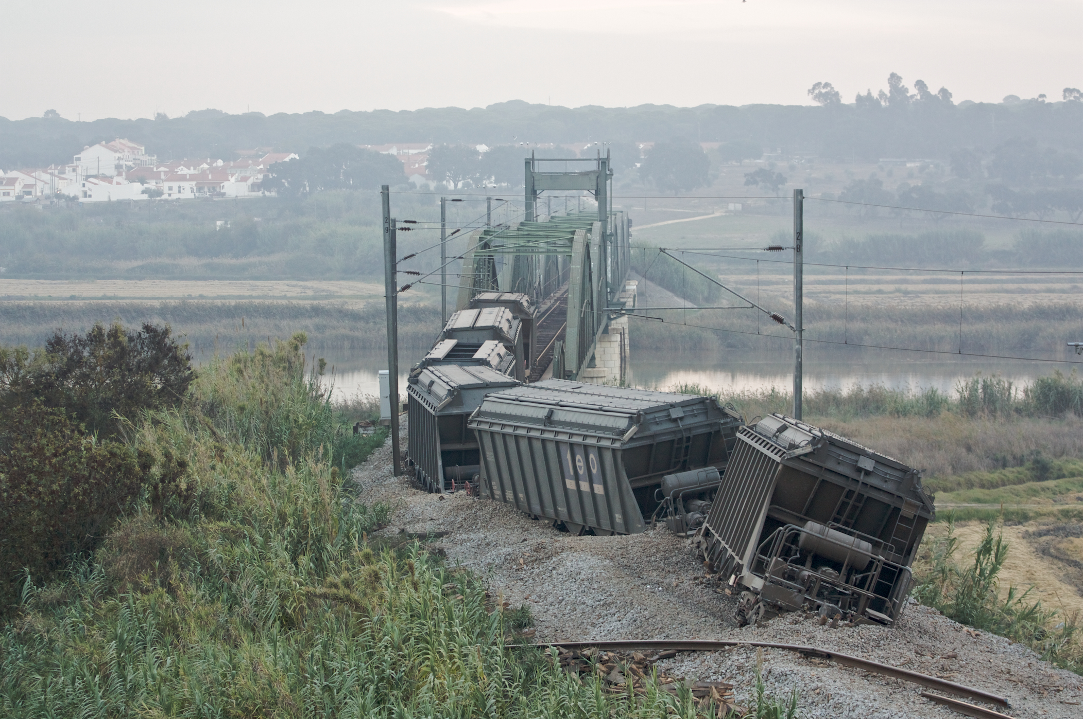 vagões Uaoos (CP Carga / Tejo Energia) descarrilados. Interrupção da circulação ferroviária na Linha do Sul. Em virtude do descarrilamento de um comboio de mercadorias, em Alcácer do Sal, encontra-se suspensa a circulação ferroviária na Linha do Sul, entre Setúbal e Grândola. O comboio proveniente de Sines transportava carvão e tinha como destino a Central Termoeléctrica do Pego [Comboio de Transporte de Carvão nº 66852]. Estão já em curso as averiguações conducentes a apurar as causas do acidente. A REFER lamenta os incómodos resultantes do constrangimento à circulação ferroviária naquela linha e informa que a CP está já a providenciar transporte rodoviário alternativo para os passageiros. 26 de Outubro de 2010 (comunicado REFER ) peça jornalística na SIC . esta fotografia foi publicada no . [ENG] Derailed coal wagons at Alcácer. Due to this damage (the track is still being reconstructed), the Alcácer Deviation was put to service, and trains are bypassing this location.